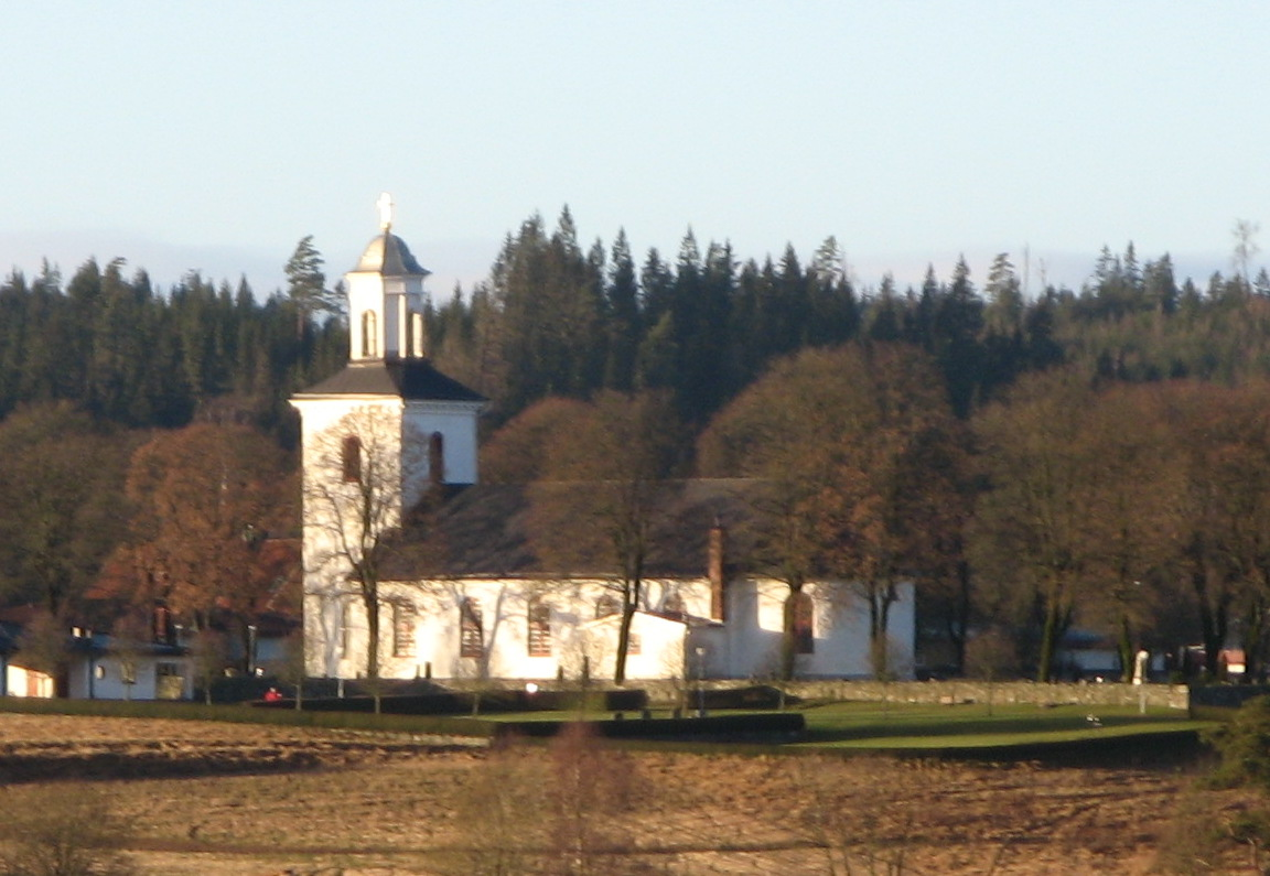 Östra Frölunda kyrka